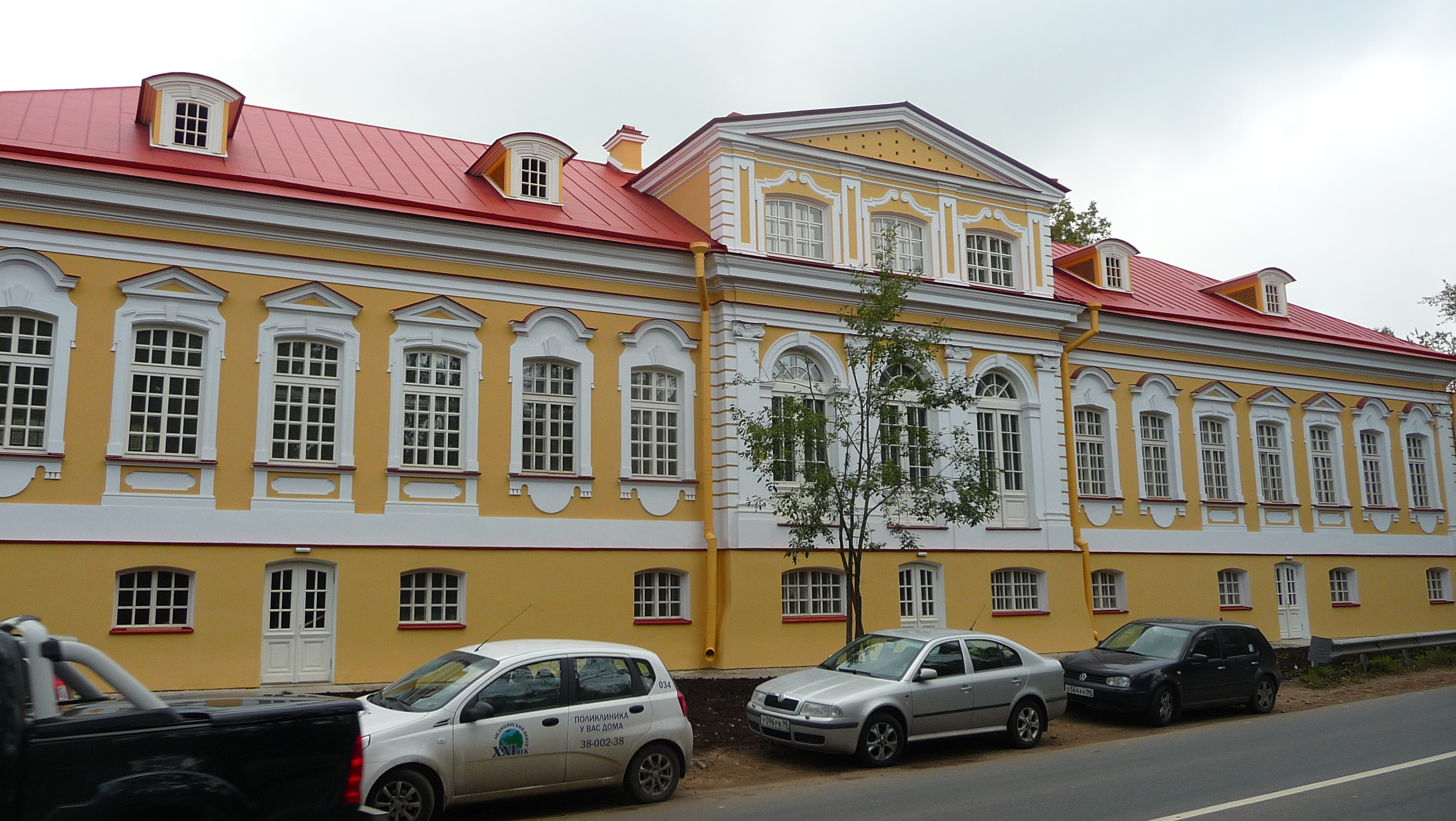 В центральном Двусветном зале и Картинной галерее располагалась коллекция живописи Петра Федоровича, состоящая из 158 живописных полотен, которая была крупнейшим дворцовым собранием середины XVIII века. Рядом с Картинной галереей находились Кунсткамера, Библиотека и Оперный зал Великого князя.